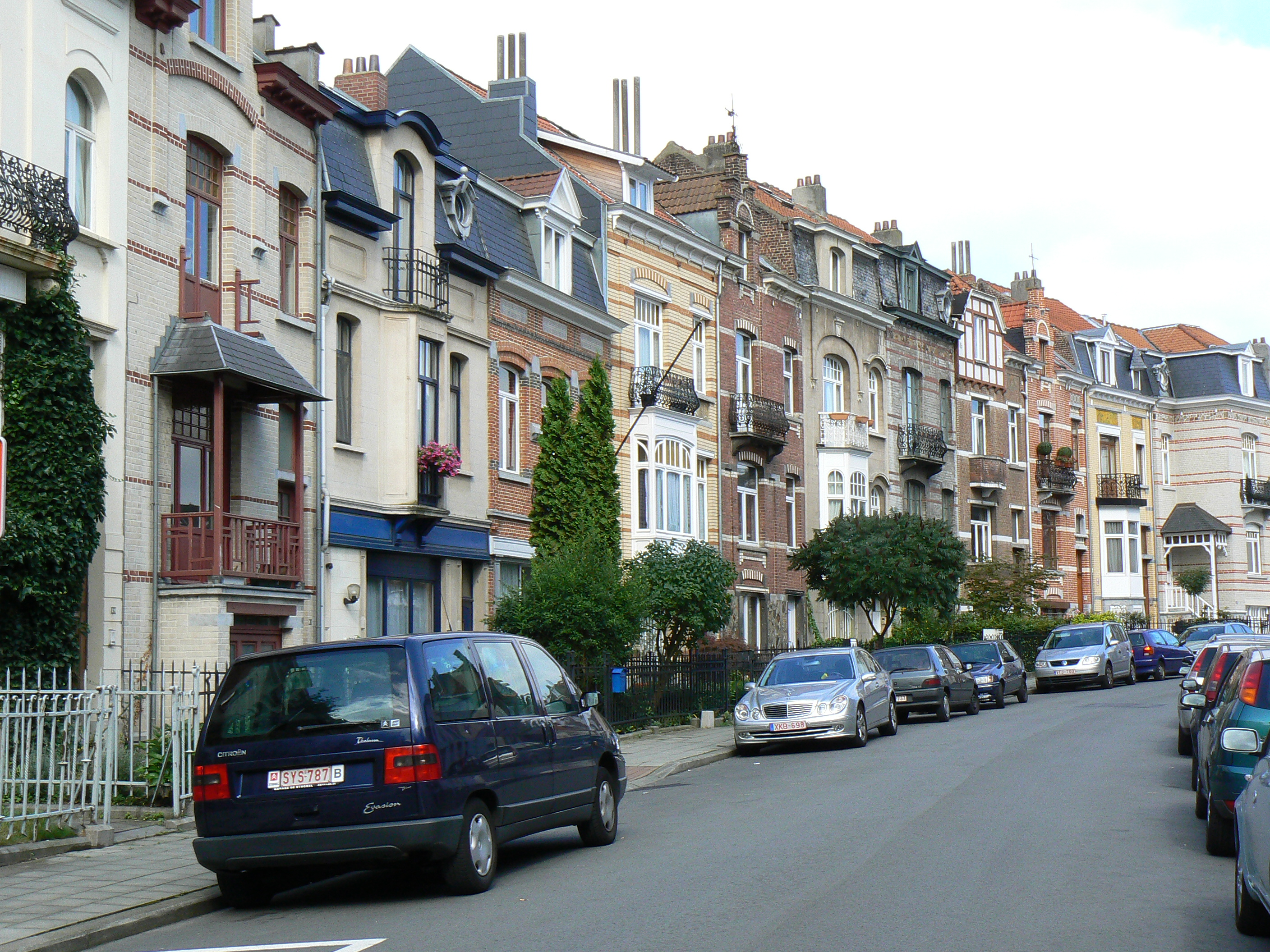 Bruxelles, Woluwe-Saint-Pierre, rue Louis Titeca